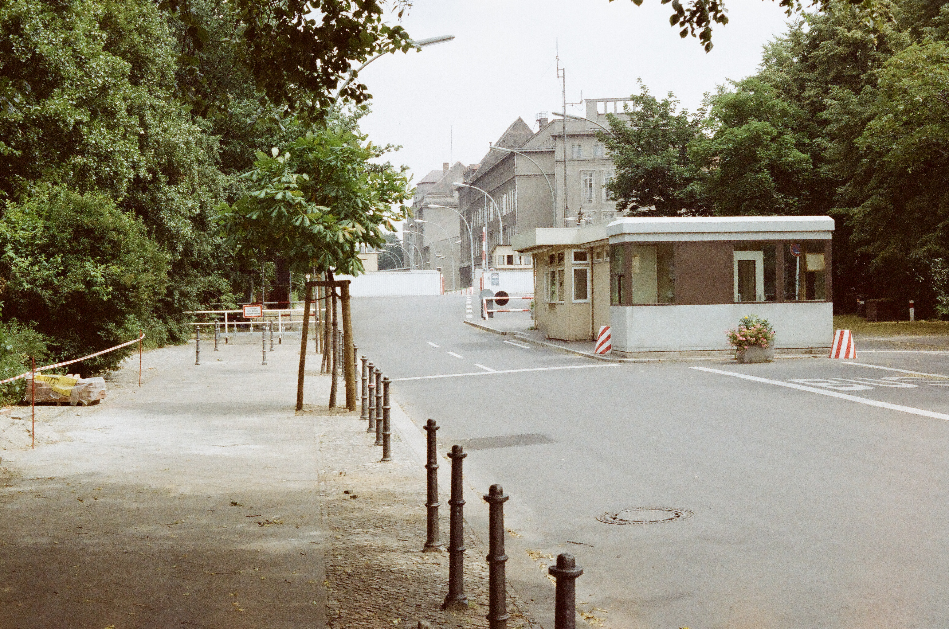 Grenzübergang Invalidenstraße in Berlin im Jahr 1987. Das Gebäude im Vordergrund der Aufnahme ist das westliche Kontrollgebäude.